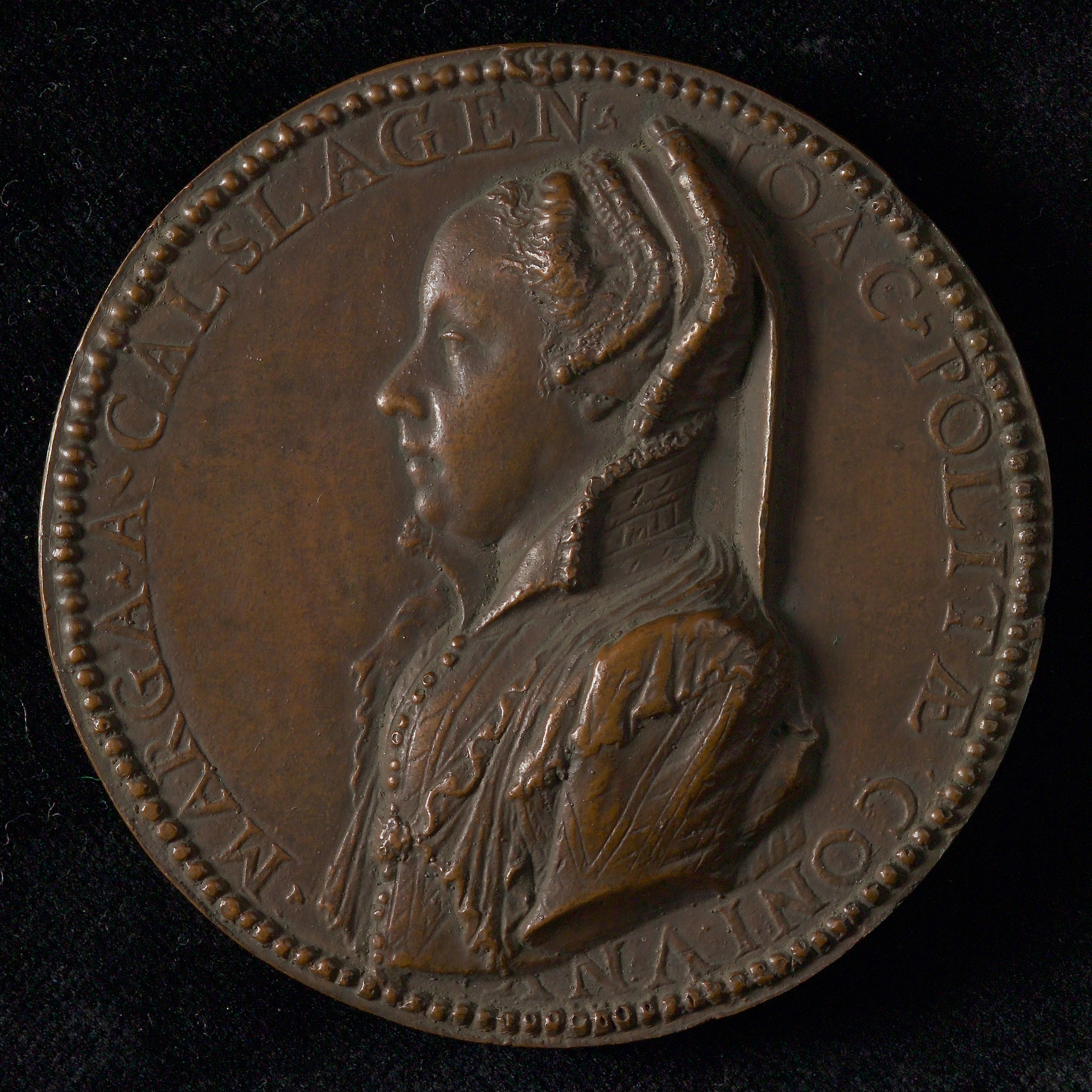 Eenzijdige bronzen penning op Margaretha van Kalslagen, echtgenote van Jochem Polites. Omschrift "MARGA. A. CALSLAGEN. - IOAC. POLITAE. CONIVNV. Vervaardiger is Jan Simons. Datering 1574 - 1650. Grootte dm 6,9. Collectie Museum Rotterdam inventarisnummer 57369Bron:Museum Rotterdam, collectie item 57369